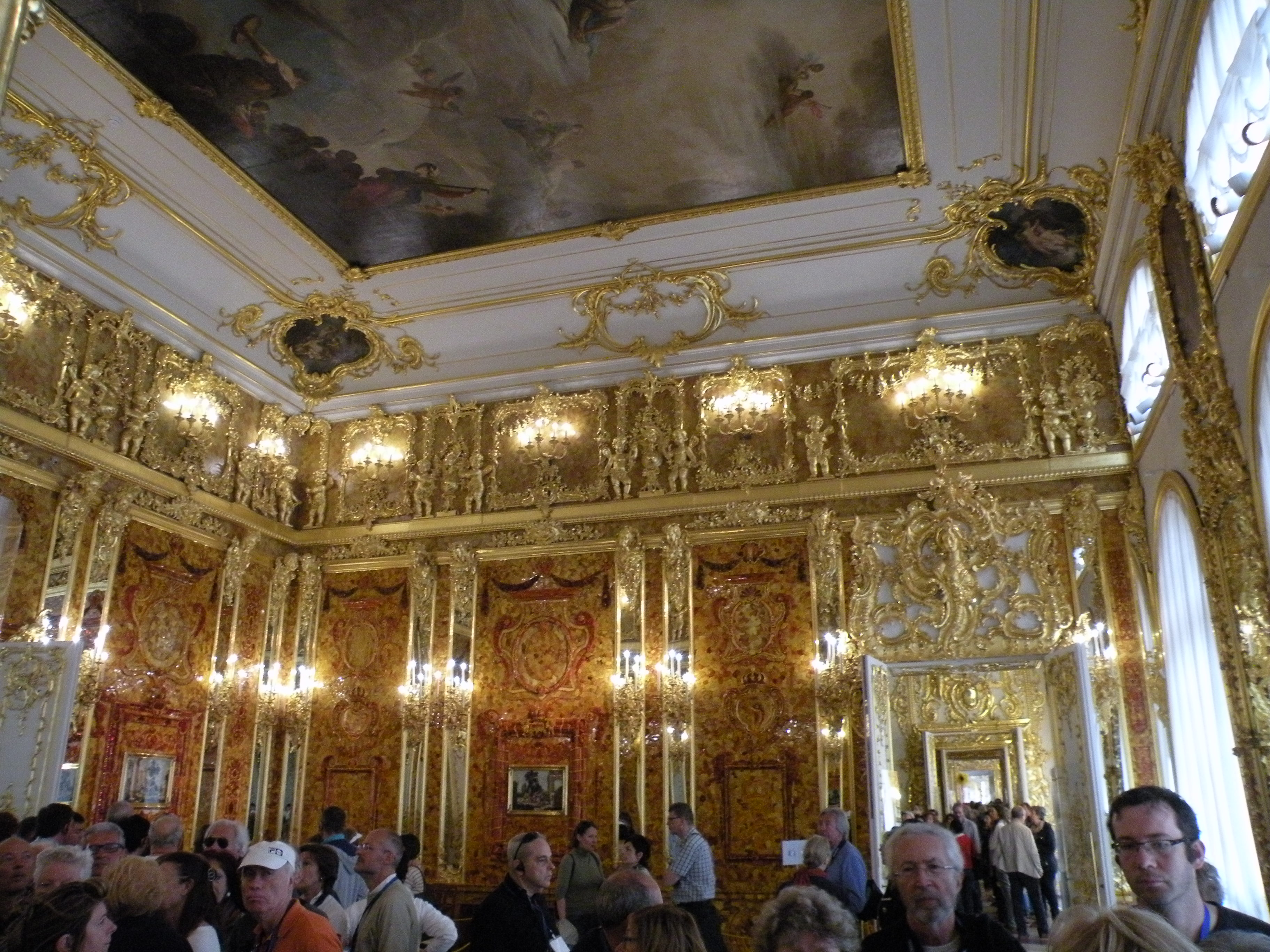 Reconstructed Amber Room